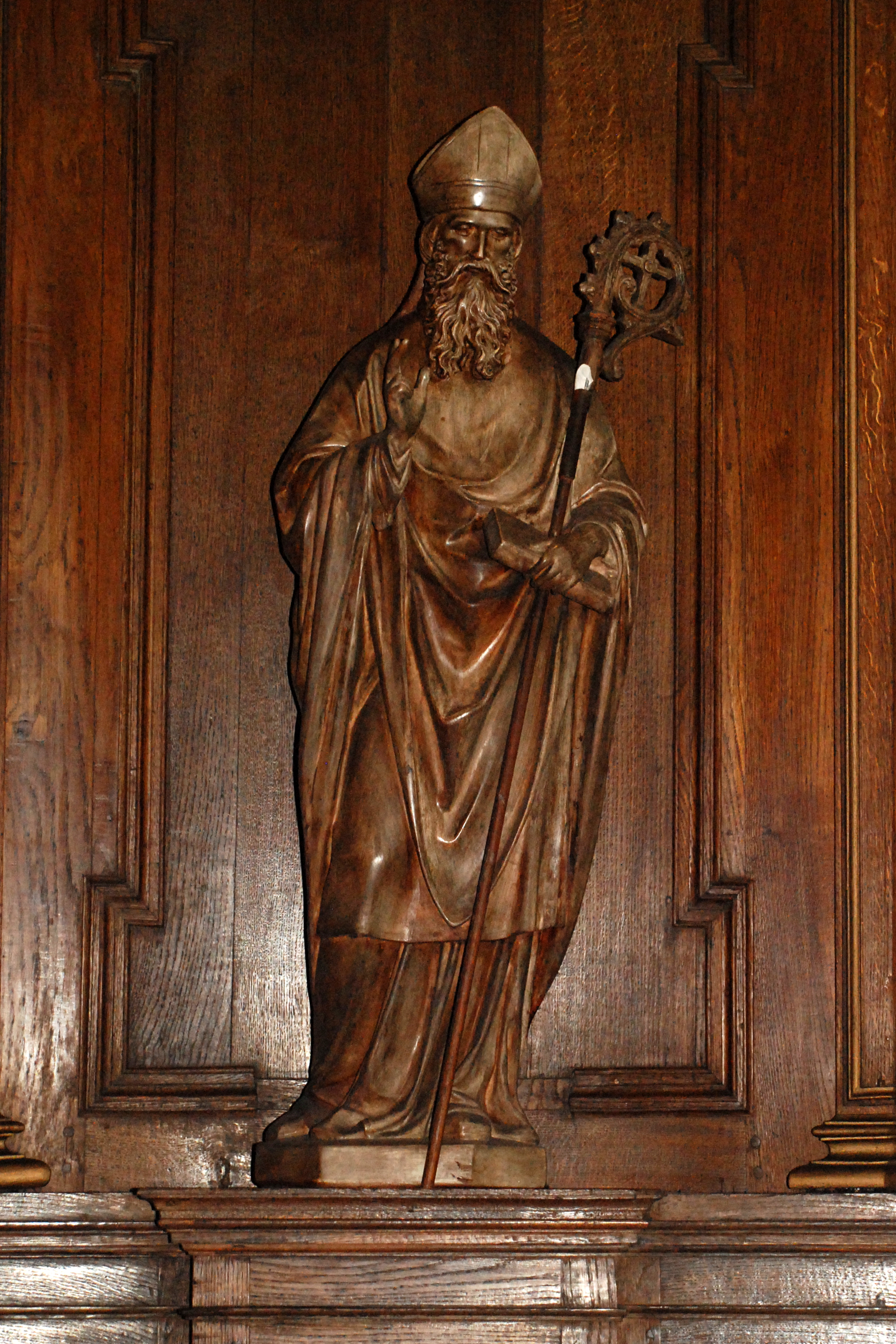 Belgique - Brabant wallon - Ottignies - Église Saint-Rémi